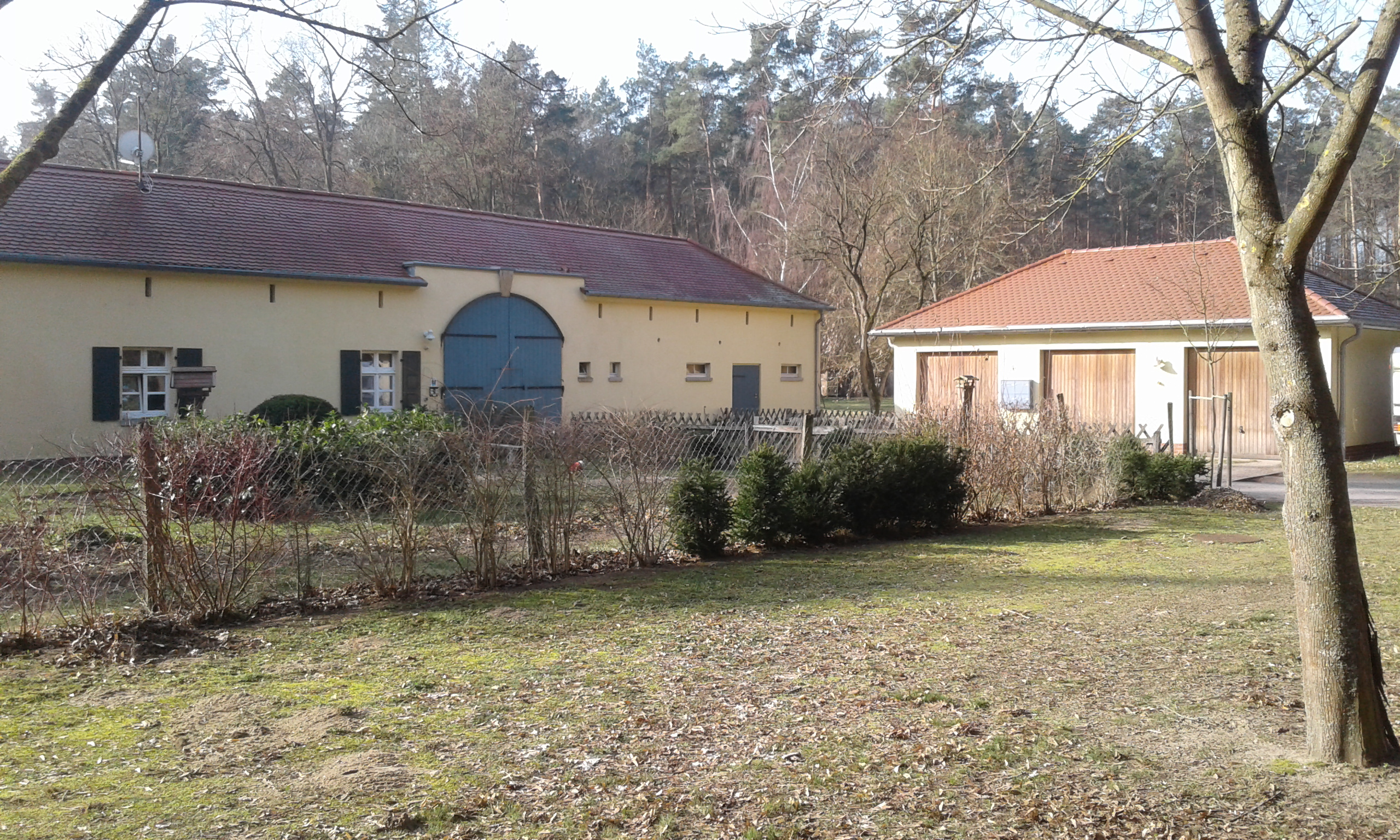 Forsthaus